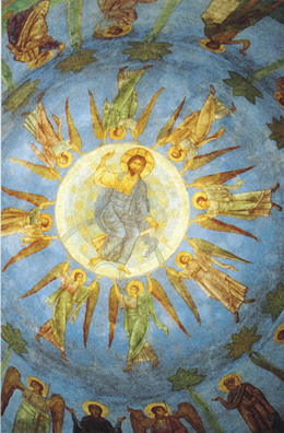 Ascension of Christ. Fresco in Mirozh Monastery. Mid. XII c. Вознесение. Фреска в куполе Спасо-Преображенского собора Мирожского монастыря. Псков. Середина XII в.